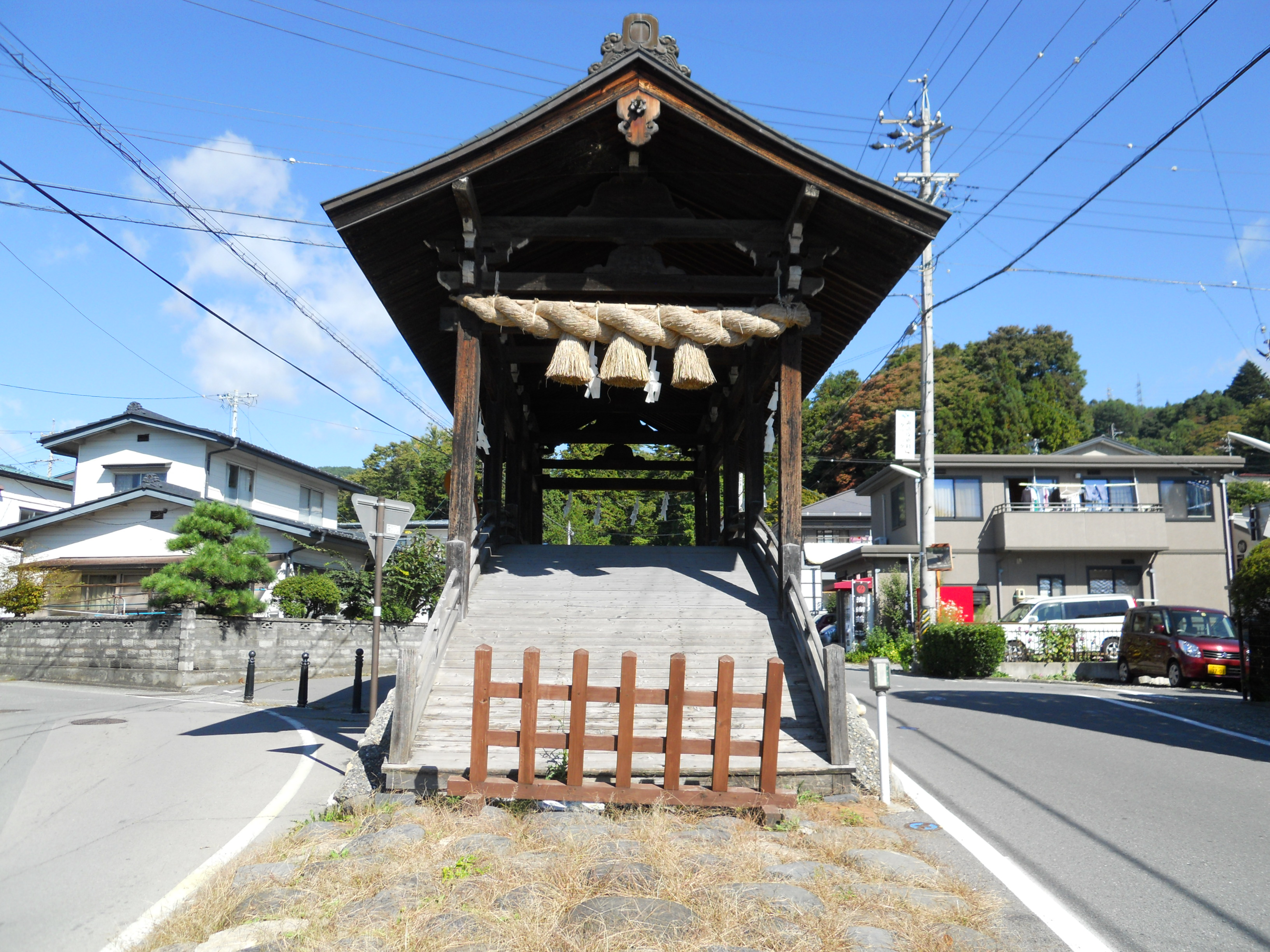 春宮下馬門